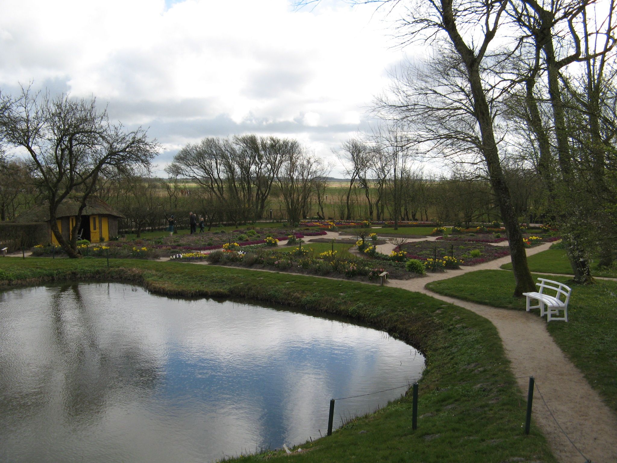 Seebüll Author: Dirk Ingo Franke